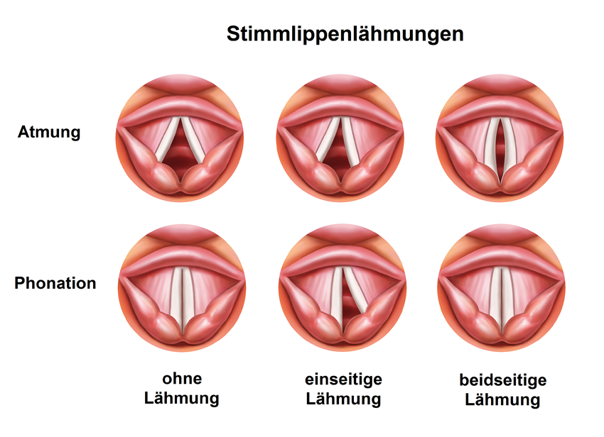 Stimmlippenstellung bei Recurrensparesen